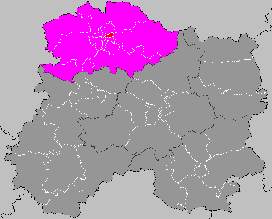 Localisation du canton de Reims-2